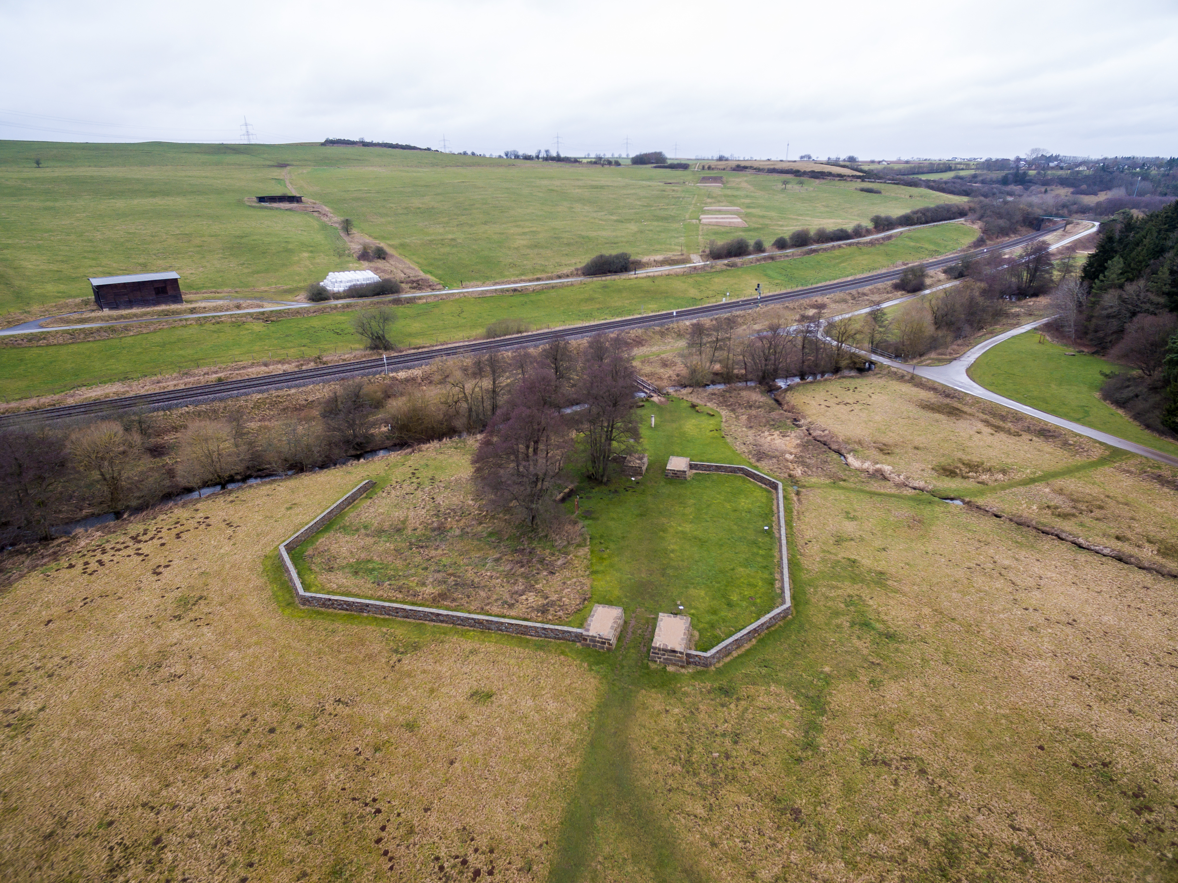 Werkplatz Steinrütsch bei Nettersheim, mit Mauerverlauf des römischen Kleinkastells. In Verlängerung des Weges durch das Kleinkastell zu dem Hügel am Horizont mit dem Matronenheiligtum Görresburg sind Fundamente der römischen Streifenhäuser zu sehen. Lage: Naturschutzgebiet „Urfttal mit Seitentälern südlich Nettersheim“ (EU-021)